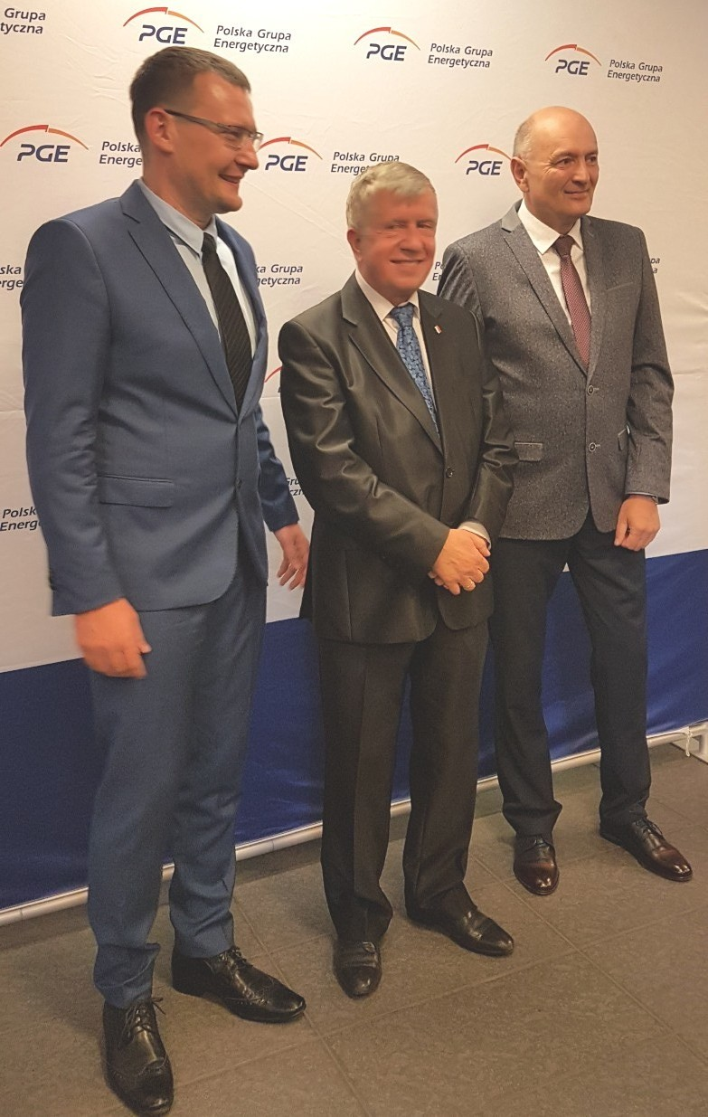 70-lecie, bankiet jubileuszowy